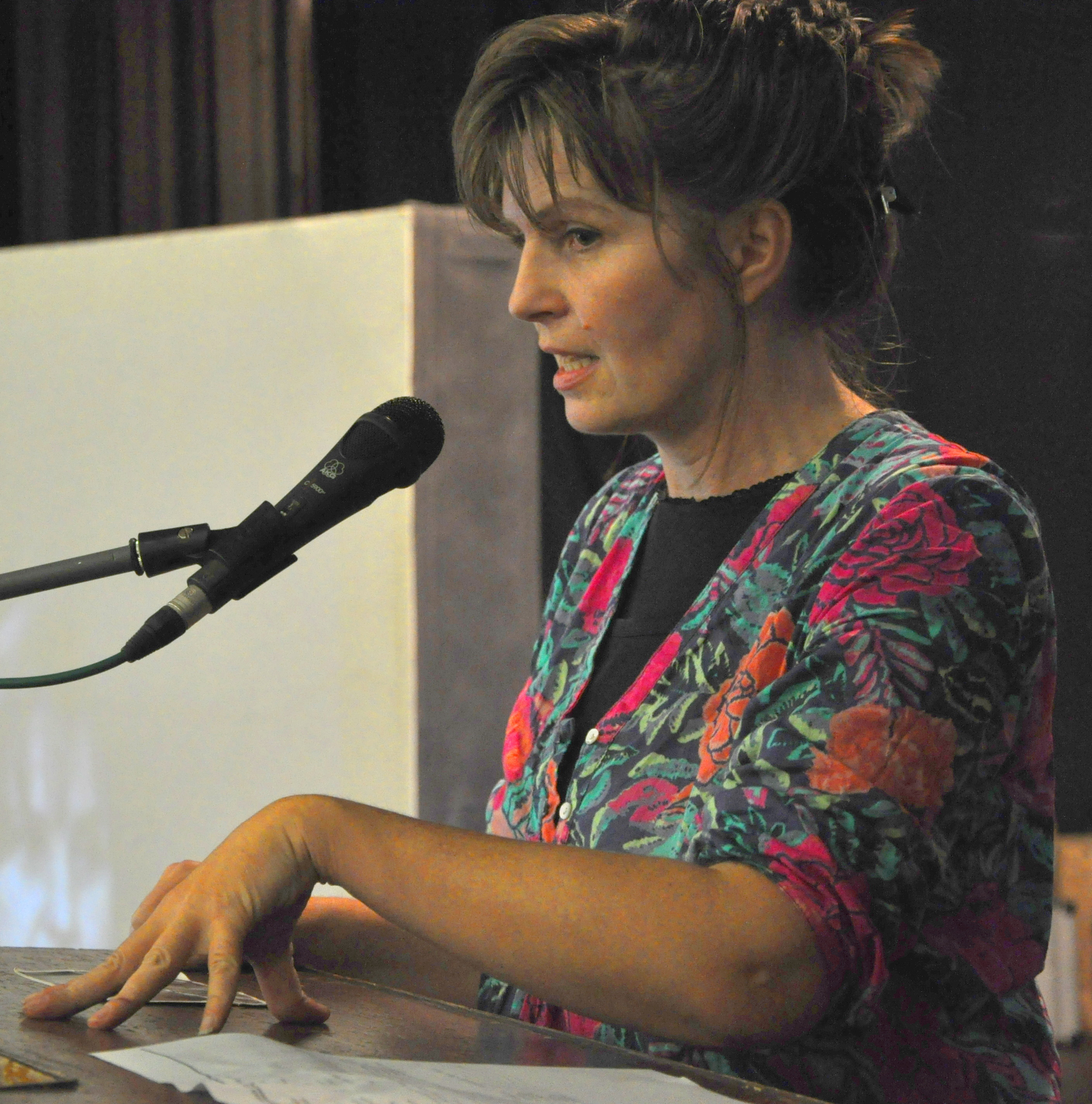 Czech journalist Petra Procházková